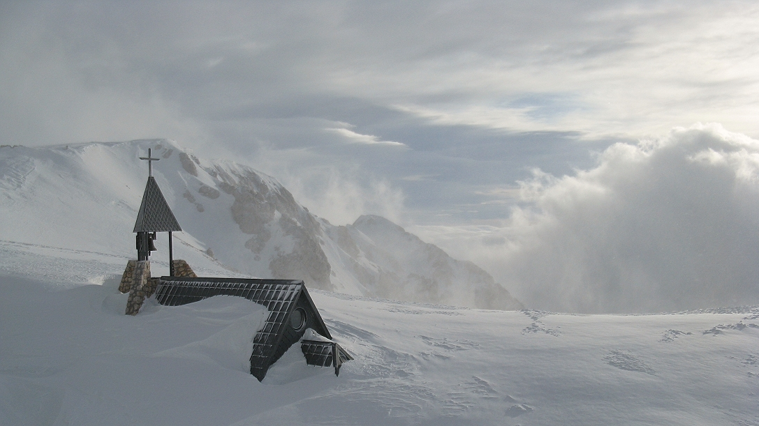 Kredarica